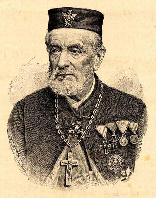 Портрет, са насловне страница часописа Босанска вила од 15. марта 1897. године На слици Јован Сундечић, Цела насловна страна: :Датотека:Сундечић - Босанска вила